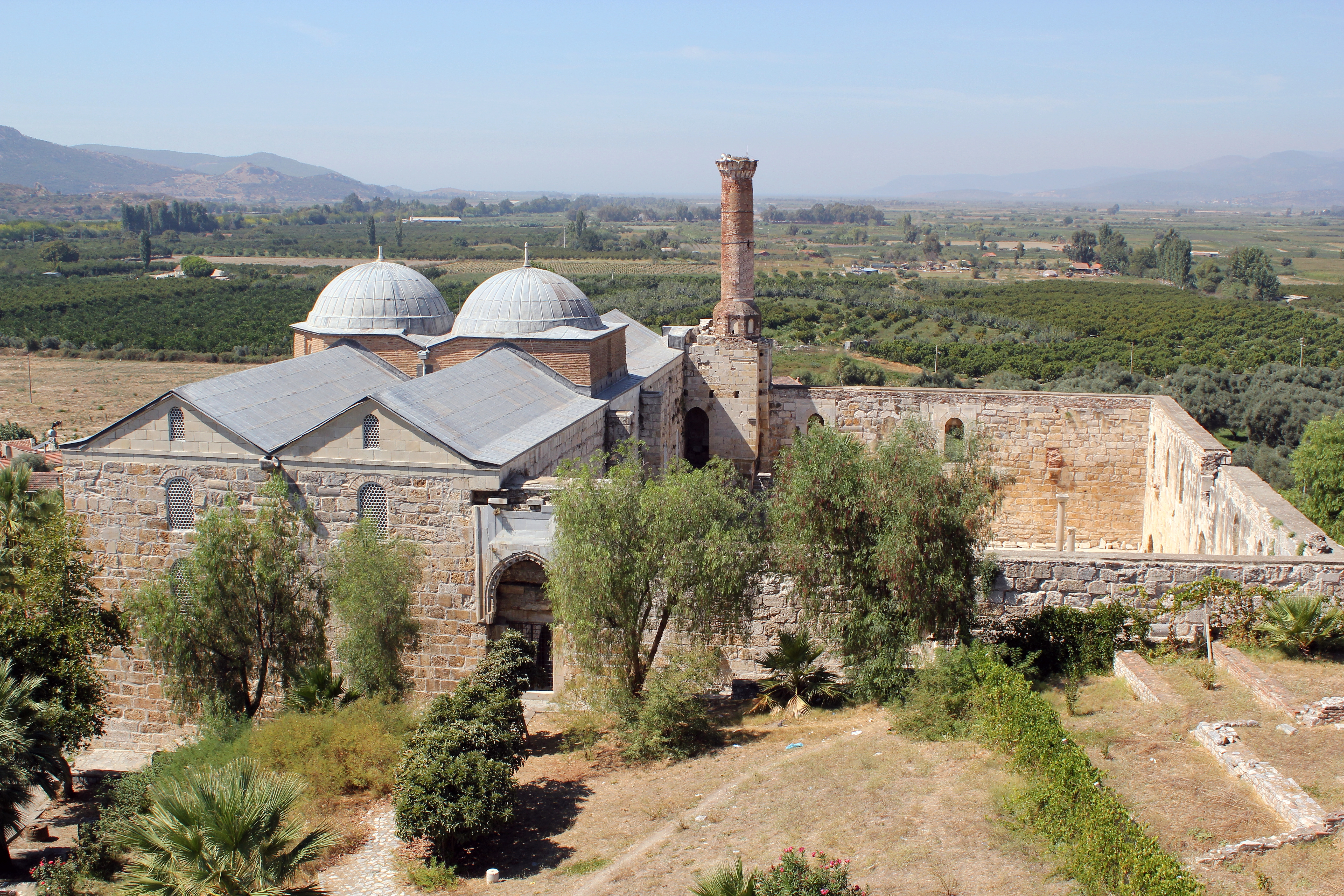 Isabey-Moschee in Selçuk, Westtürkei, von der Johanneskirche aus gesehen